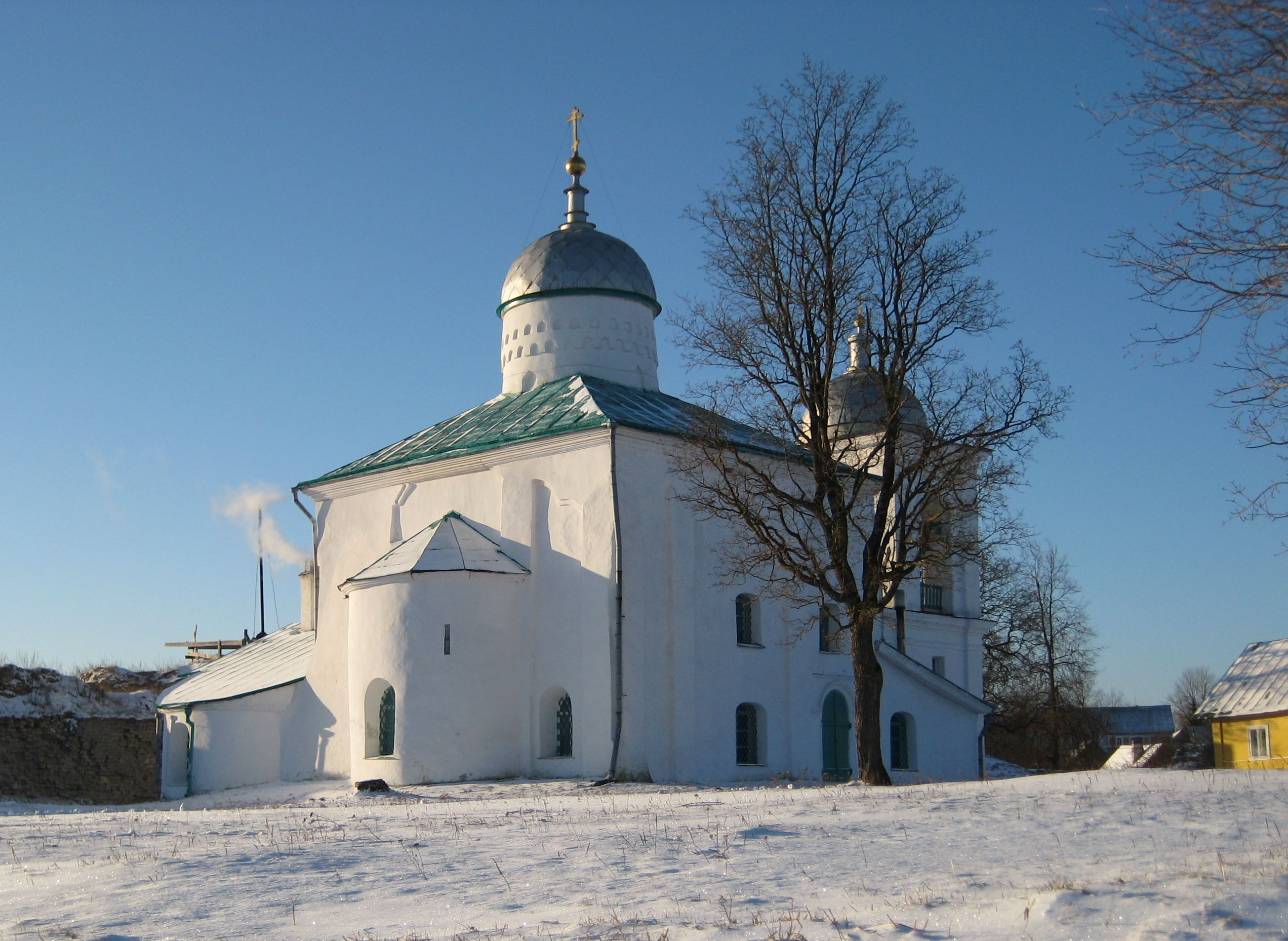 Church of St. Nicola in Izborsk Fortress. Никольский собор в Изборске. XIV в.